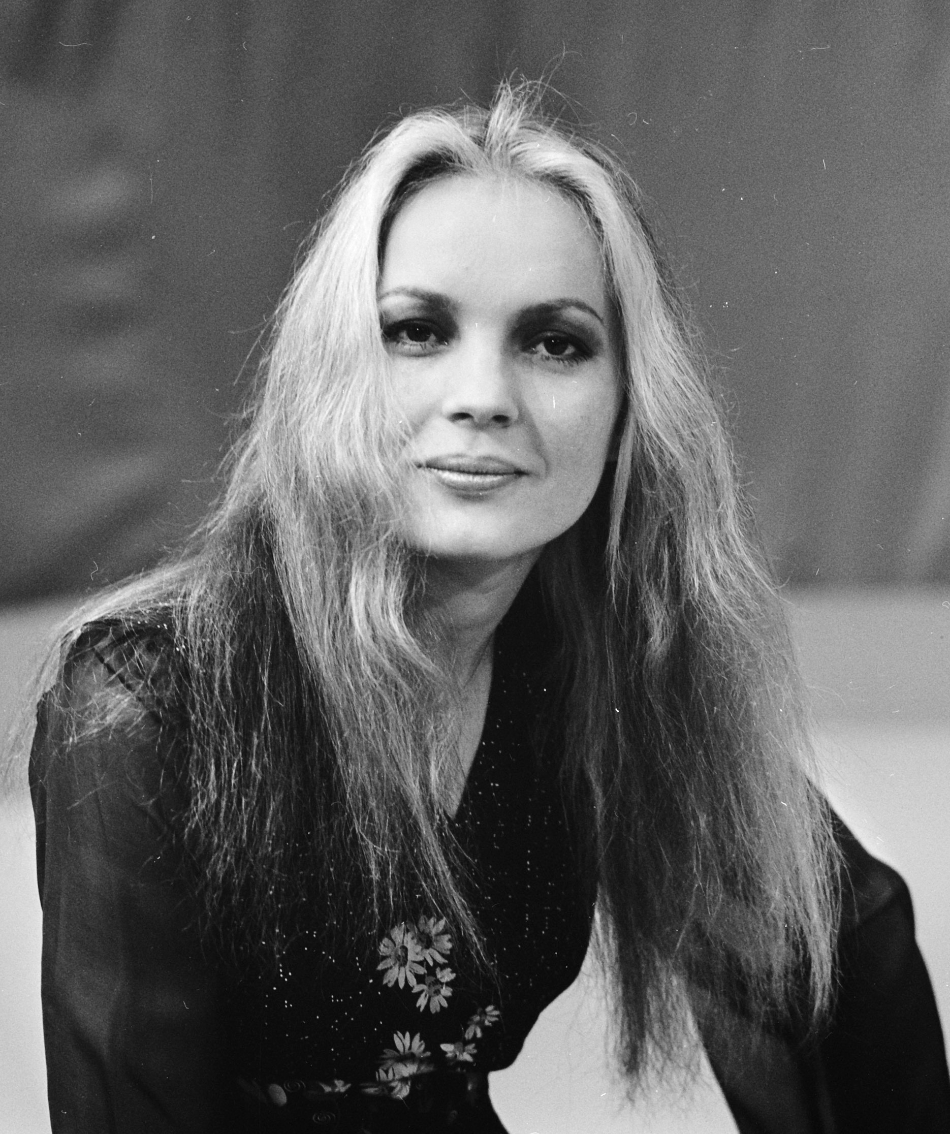 De Amerikaanse zangeres Chi Coltrane tijdens opnamen voor het AVRO televisieprogramma Toppop